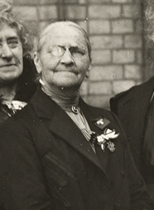 Tittel / Title: Det internasjonale kvinneråds møte, Stortinget Beskrivelse / Description: Pauline Chaponnière-Chaix var president for ICW fra 1920-1922. Dato / Date: ca 1920 Fotograf / Photographer: ukjent / unknown Sted / Place: Oslo, Stortinget Eier / Owner Institution: Nasjonalbiblioteket / National Library of Norway Lenke / Link: Bildesignatur / Image Number: blds_05884